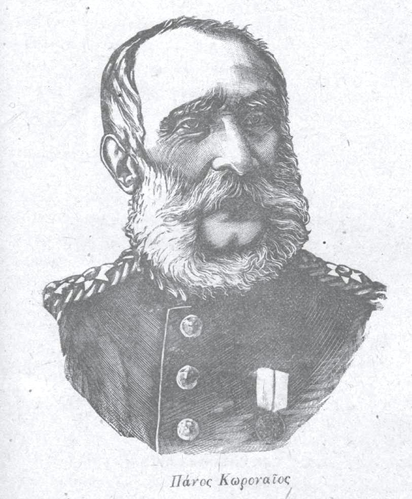 Foto eines namhaften griechischen Militärs und Politikers, 19. Jahrhundert.